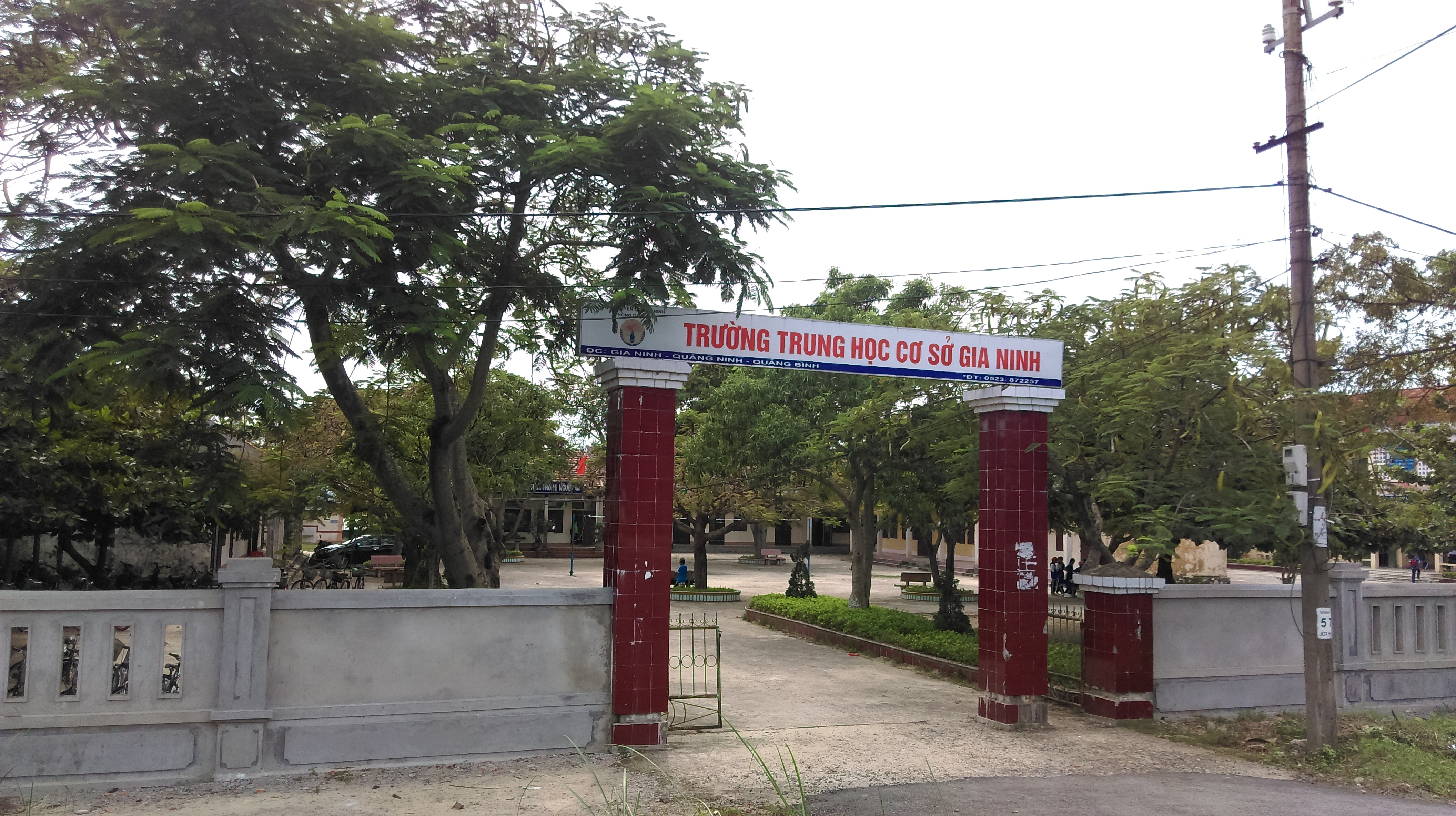 Trường THCS Gia Ninh, Quảng Ninh, Quảng Bình